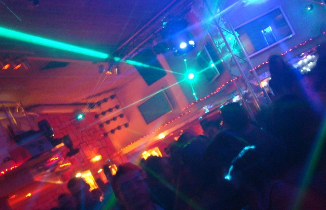 Le rythme de la nuit à la discothèque le Poisson Rouge à Wintzenheim